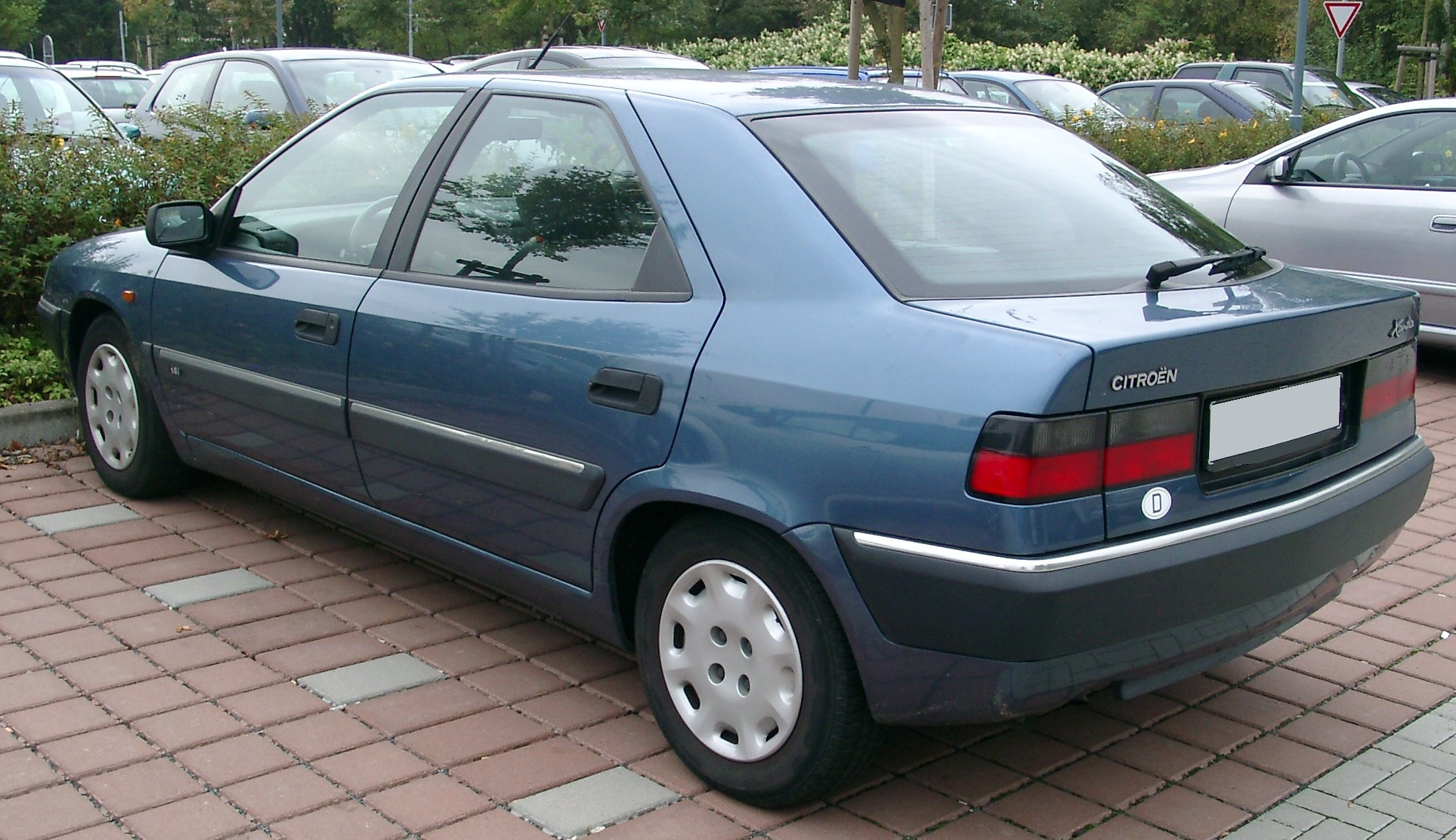 Citroën Xantia